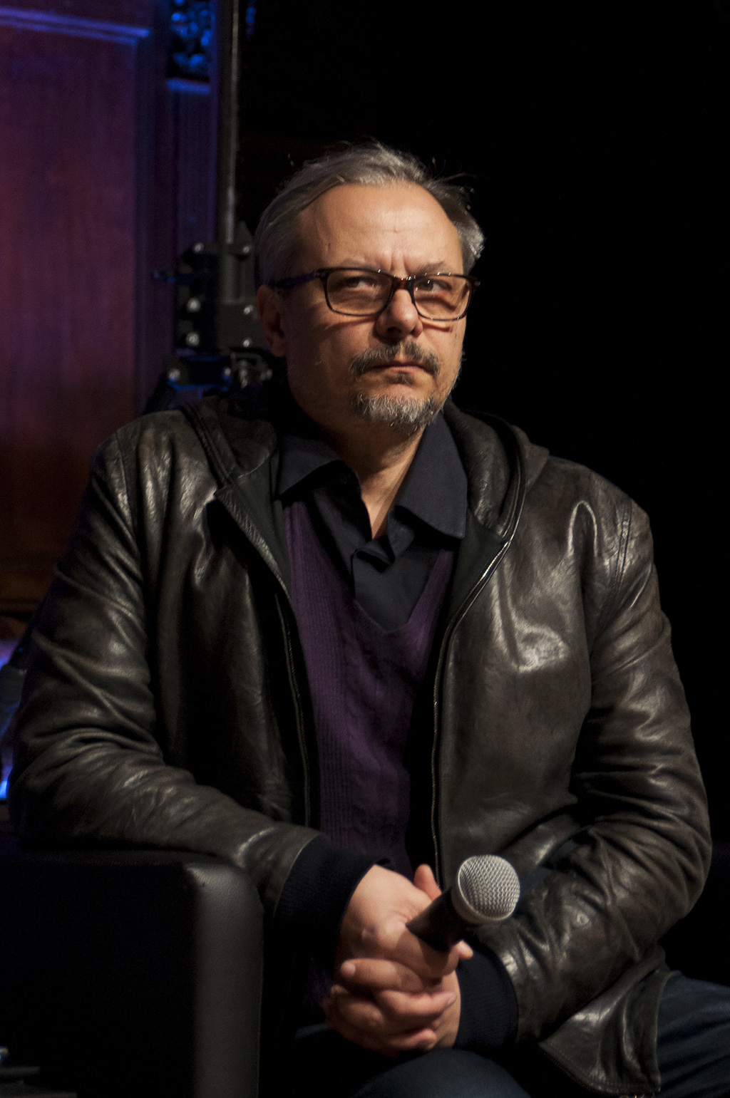 Luca Valtorta, giornalista, al Festival Internazionale del Giornalismo di Perugia, 2016